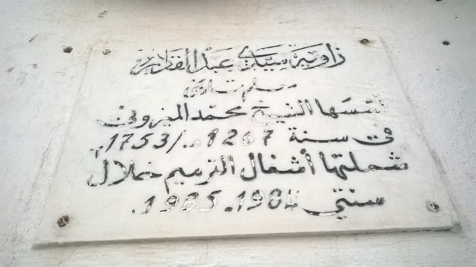 La médina de Tunis مدينة تونس العتيقة